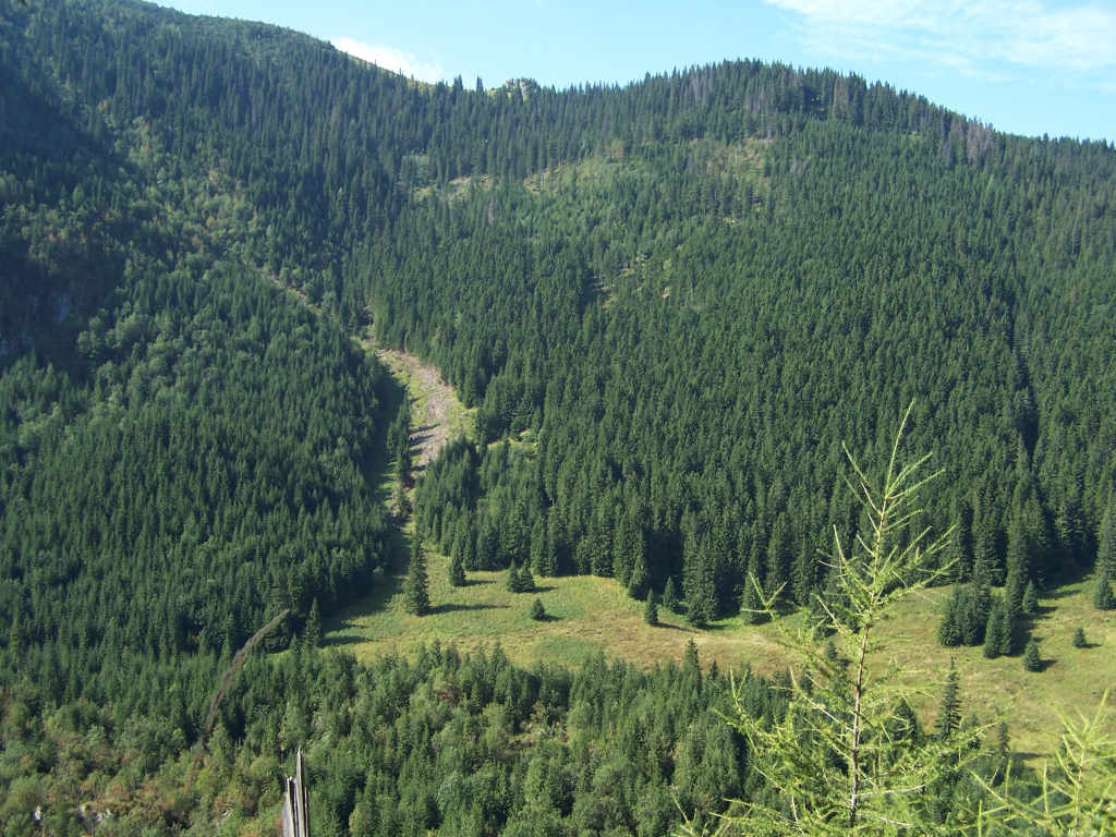 Wołowy Żleb (Tatra Mountains, Dolina Miętusia)